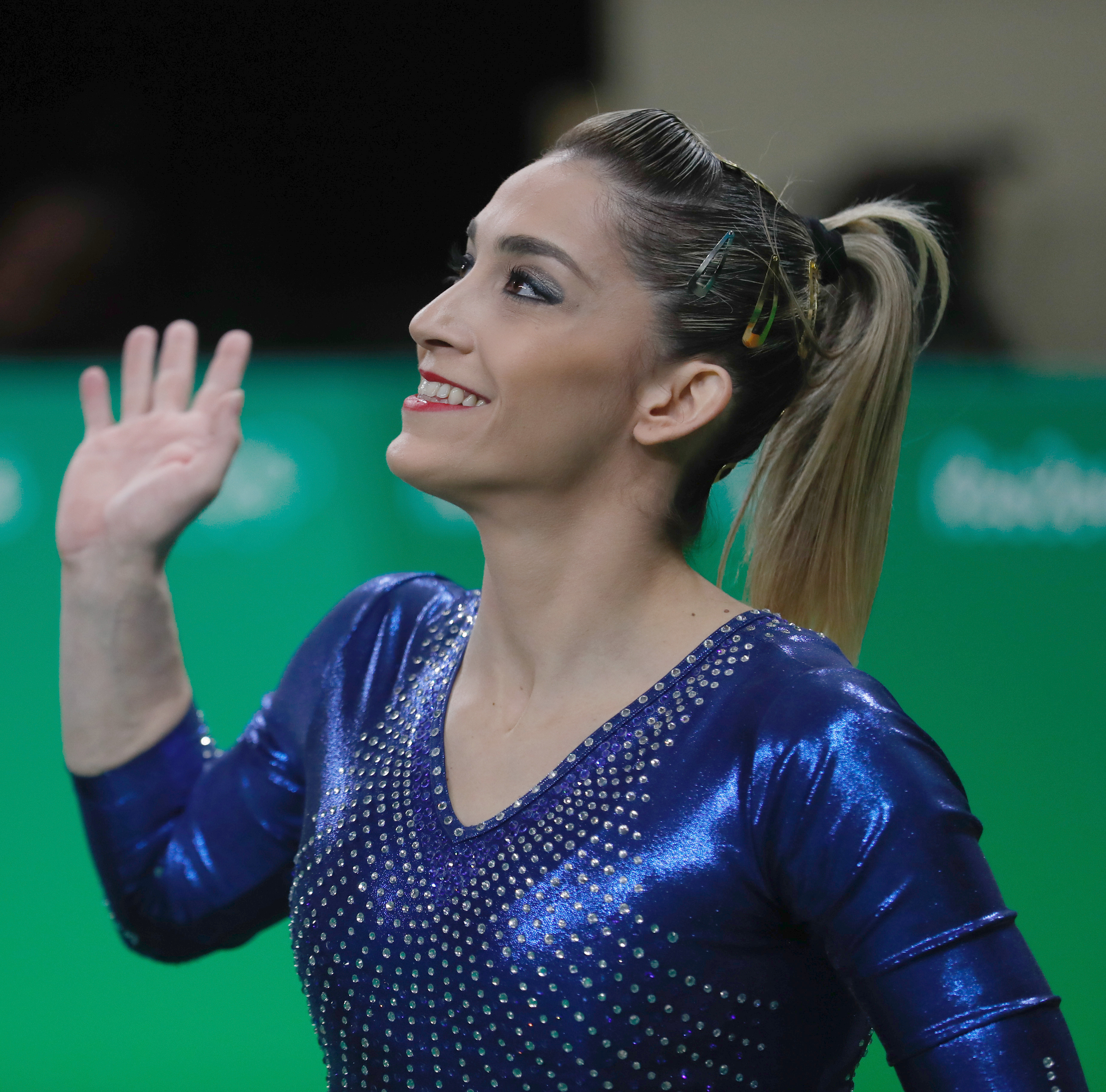 Rio de Janeiro - Danieler Hypolito durante final por equipes da ginástica artística feminina nos Jogos Olímpicos Rio 2016, em que o Brasil terminou em 8º lugar. (Fernando Frazão/Agência Brasil)